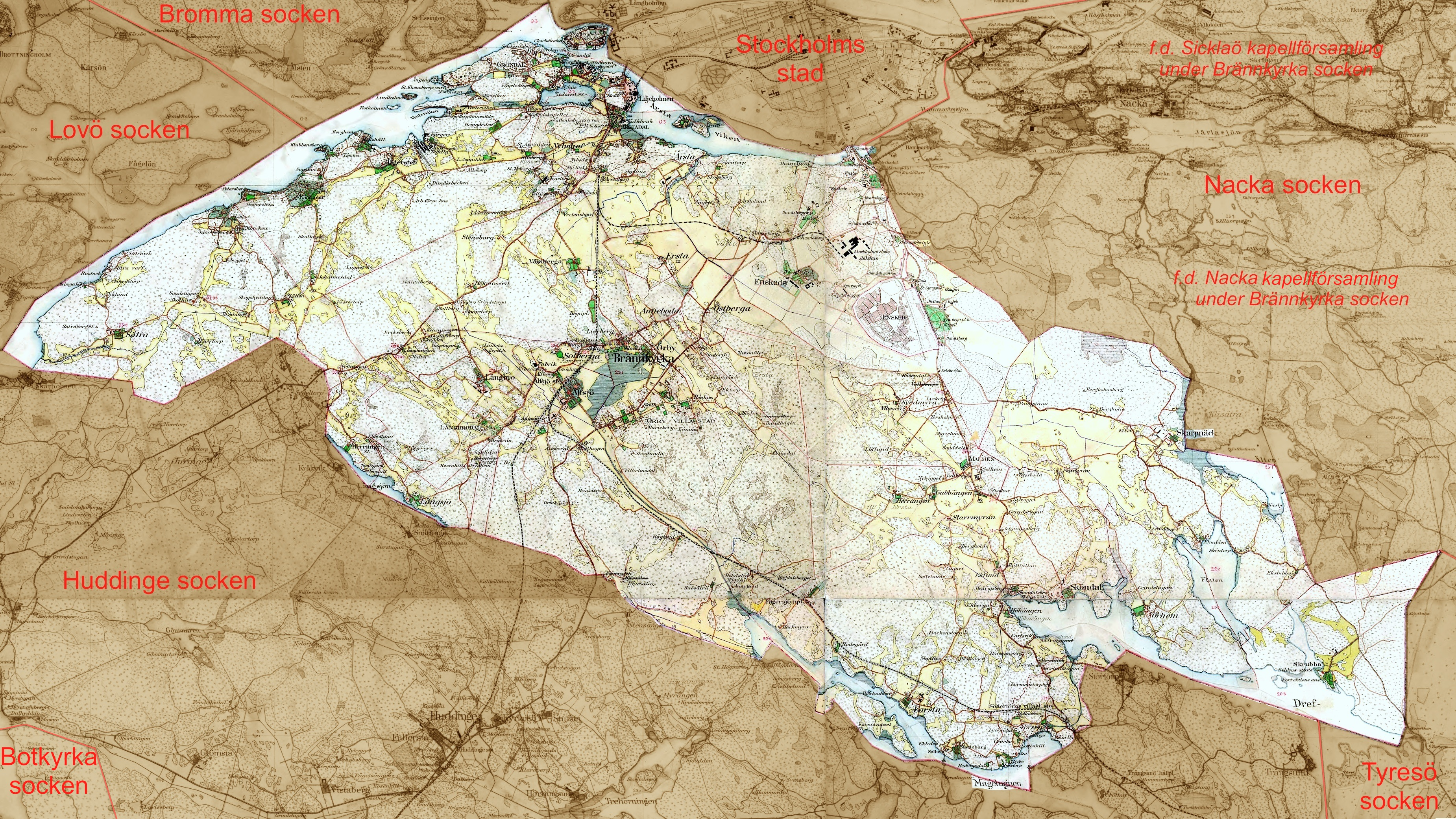 Häradsekonomisk karta över Brännkyrka socken från 1901-1906.